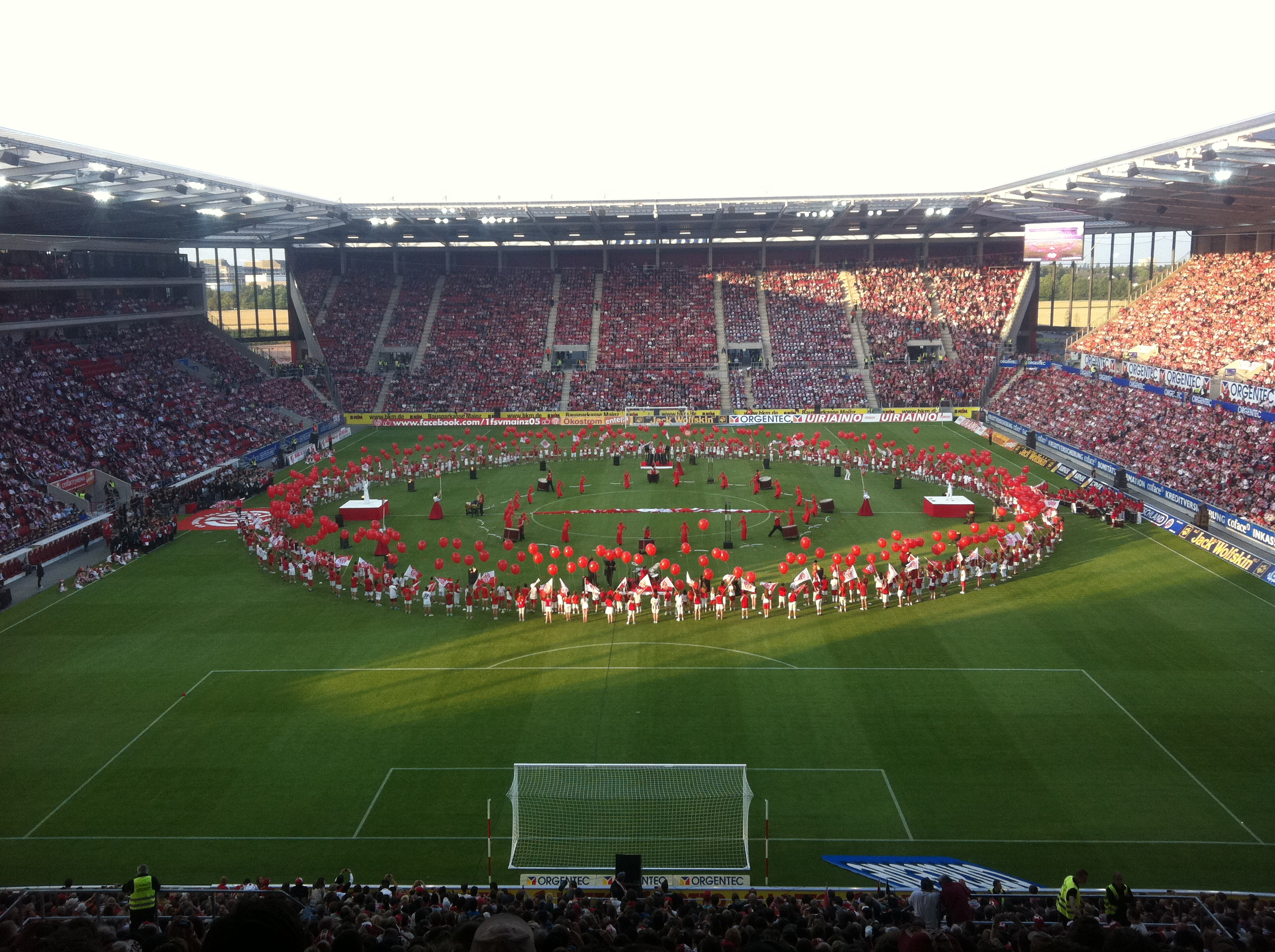 Bild der Eröffnungsfeier der neuen Coface Arena vom 1. FSV Mainz 05 am 03.07.2011